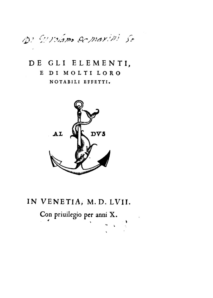 De gli elementi, e di molti loro notabili effetti. - In Venetia : [Paolo Manuzio], 1557. - XXXIIII c. ; 4º. - Nome dell'Autore, Paolo Manuzio, si ricava dalla dedica a carta A2r .